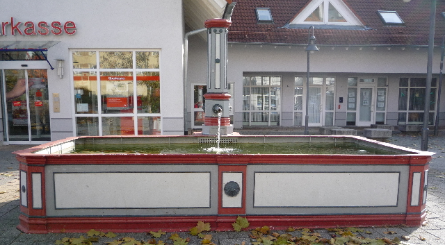 Burgbrunnen